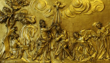 Teil der Barocken Innenausstattung der Stadtpfarrkirche Graz